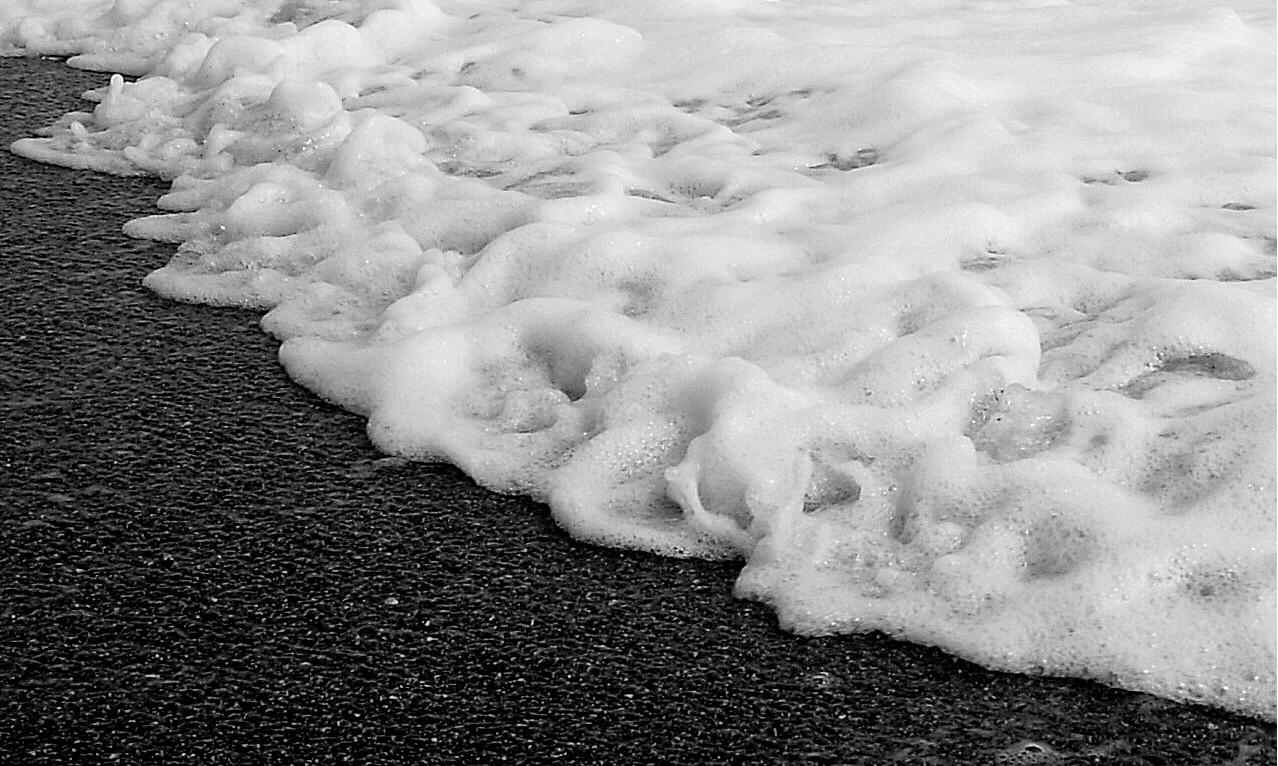 Sea foam.